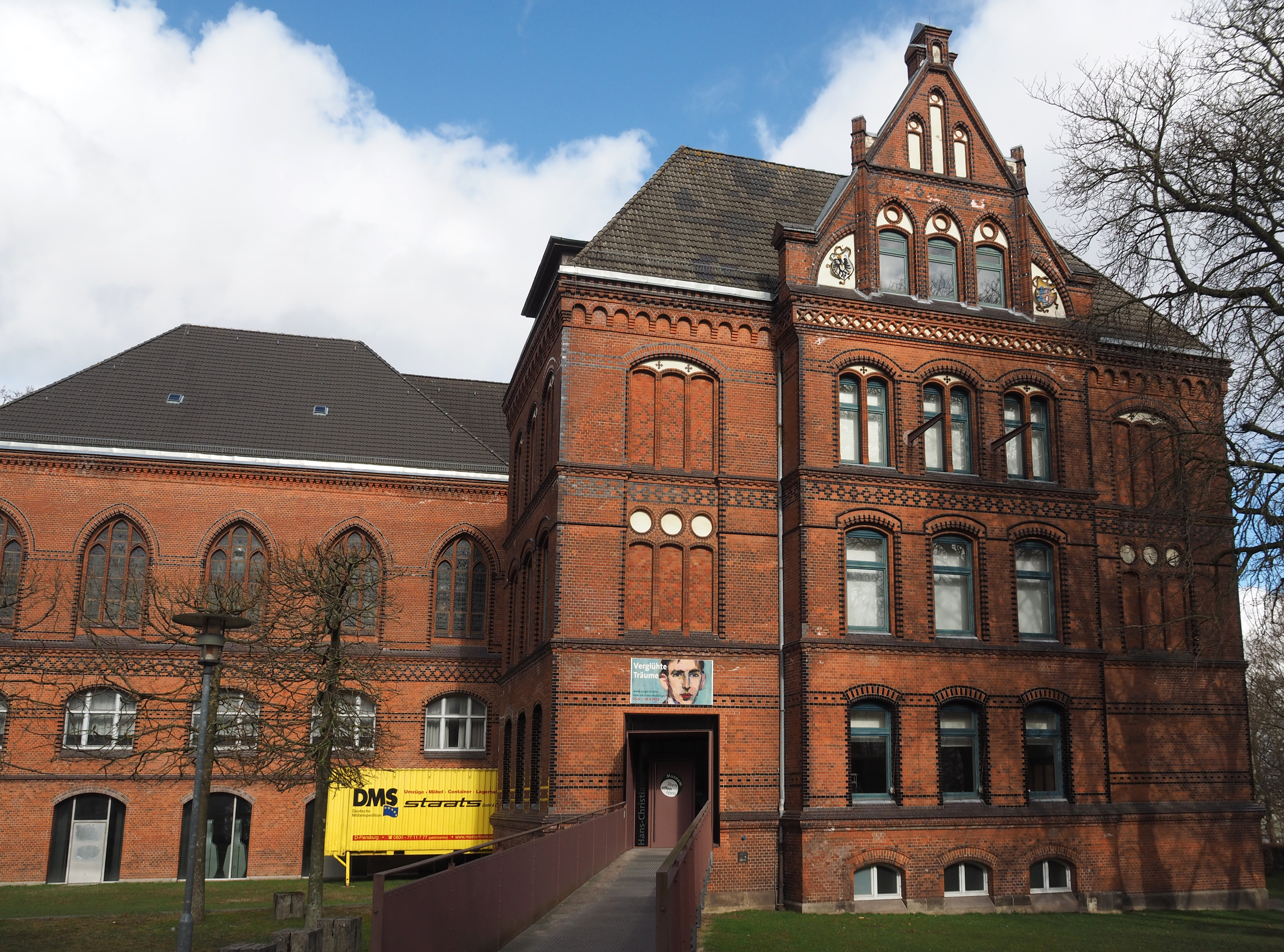 Museumsberg Flensburg - Hans-Christiansen-Haus